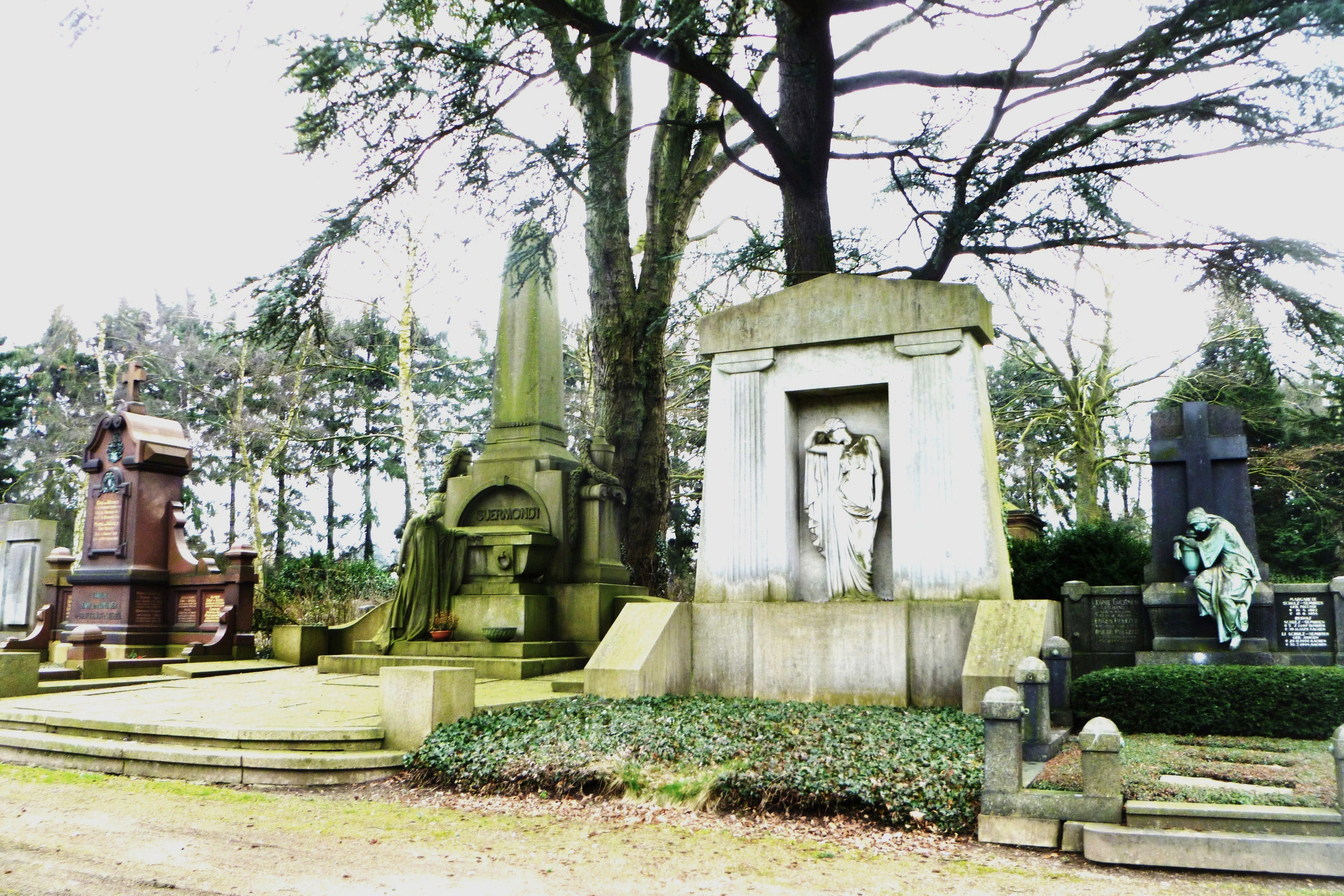 Familien-Grabstätten der Aachener Industriellen von Wedel, Suermondt, Cockerill und Lochner auf dem Westfriedhof I in Aachen